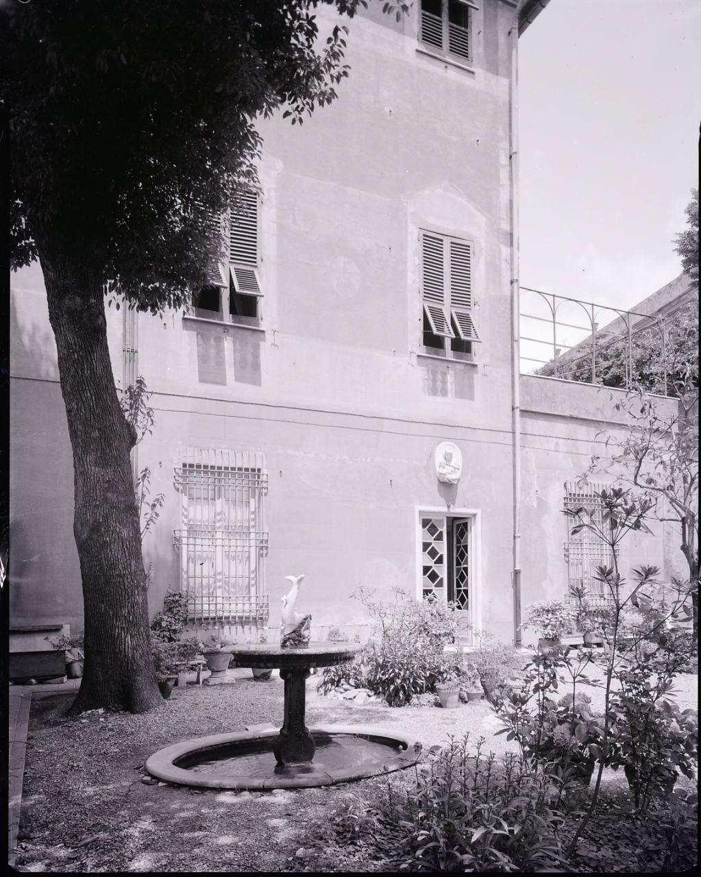 Servizio fotografico : Genova, 1963 / Paolo Monti. - Buste: 9, Fototipi: 9 : Negativo b/n, gelatina bromuro d'argento/ pellicola ; 10x12. - ((Serie costituita da 9 buste sciolte di negativi identificati con i nn.: 6543, 6543bis (copia del n. 6543), 6590, 6591, 6592, 6593, 6594, 6595, 6596. - Il negativo identificato con il numero 46397 è stato realizzato per Zodiac. - Occasione: Documentazione per la pubblicazione: Italia Nostra (a cura di), "Le ville genovesi", catalogo della mostra, Genova 1962, Genova, Comune di Genova, 1967. - (1961-1963), presso Archivio Paolo Monti. - Fonte: Agenda di Paolo Monti: R 1 - Monti/ 1 aprile 1963 - 6 giugno 1964/ 6000-8193 (1963-1964), presso Archivio Paolo Monti (1967). - Fonte: Lettera di Paolo Monti: I. Carteggi/ Genova - Enrico (1963-1966), presso Archivio Paolo Monti. Camicia con documenti dattiloscritti e manoscritti vari relativi al lavoro eseguito per Italia Nostra: preventivi, lettere, inventari. - Fonte: Rubrica di Paolo Monti: Archivio fino 1-4-1961/ 31-3-1963. - Fonte: Monografia di Italia Nostra (a cura di): Le ville genovesi, catalogo della mostra, Genova 1962, Genova, Comune di Genova